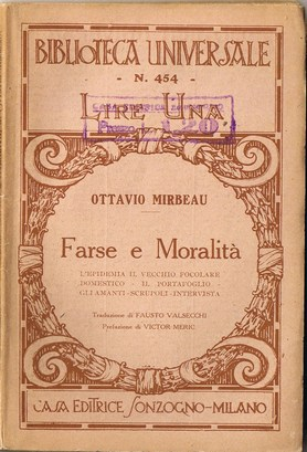 Couverture de Farse e moralità, d'Octave Mirbeau (1848-1917)